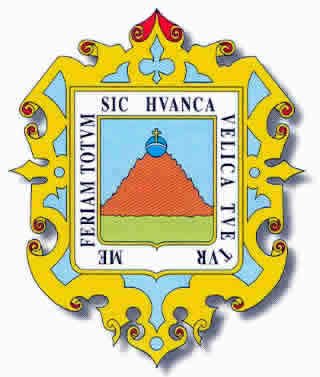 Escudo de Huancavelica